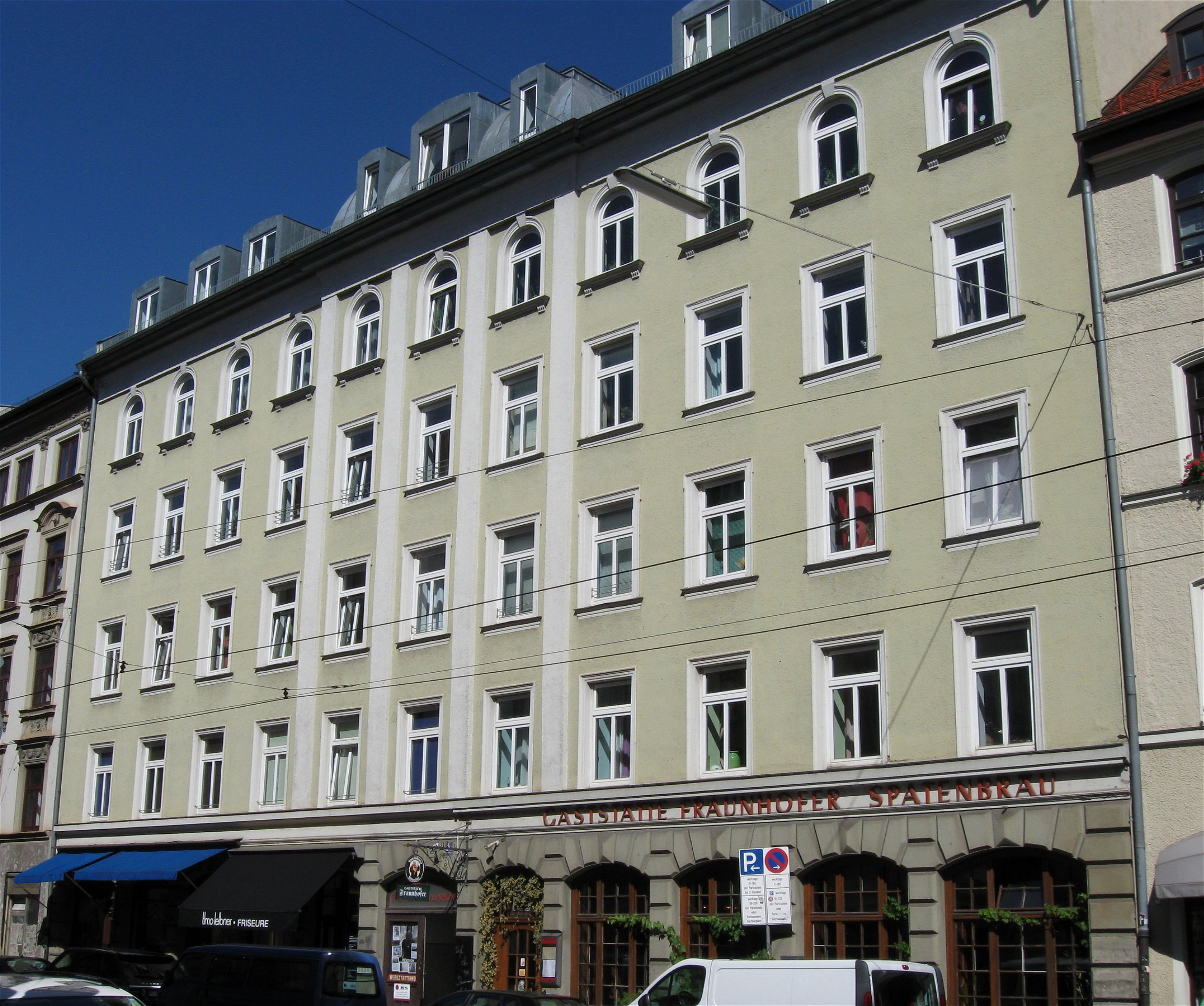 Fraunhoferstraße 9. Mietshaus, erbaut 1830 von Maurermeister Xaver Mayr und Zimmermeister Stitzinger, 1890-91 aufgestockt und in Neurenaissanceformen umgestaltet von Thomas Steinbauer; z. T. vereinfacht; neubarocker Ausstattung einer Gaststätte, von Alois Barbist, 1896.